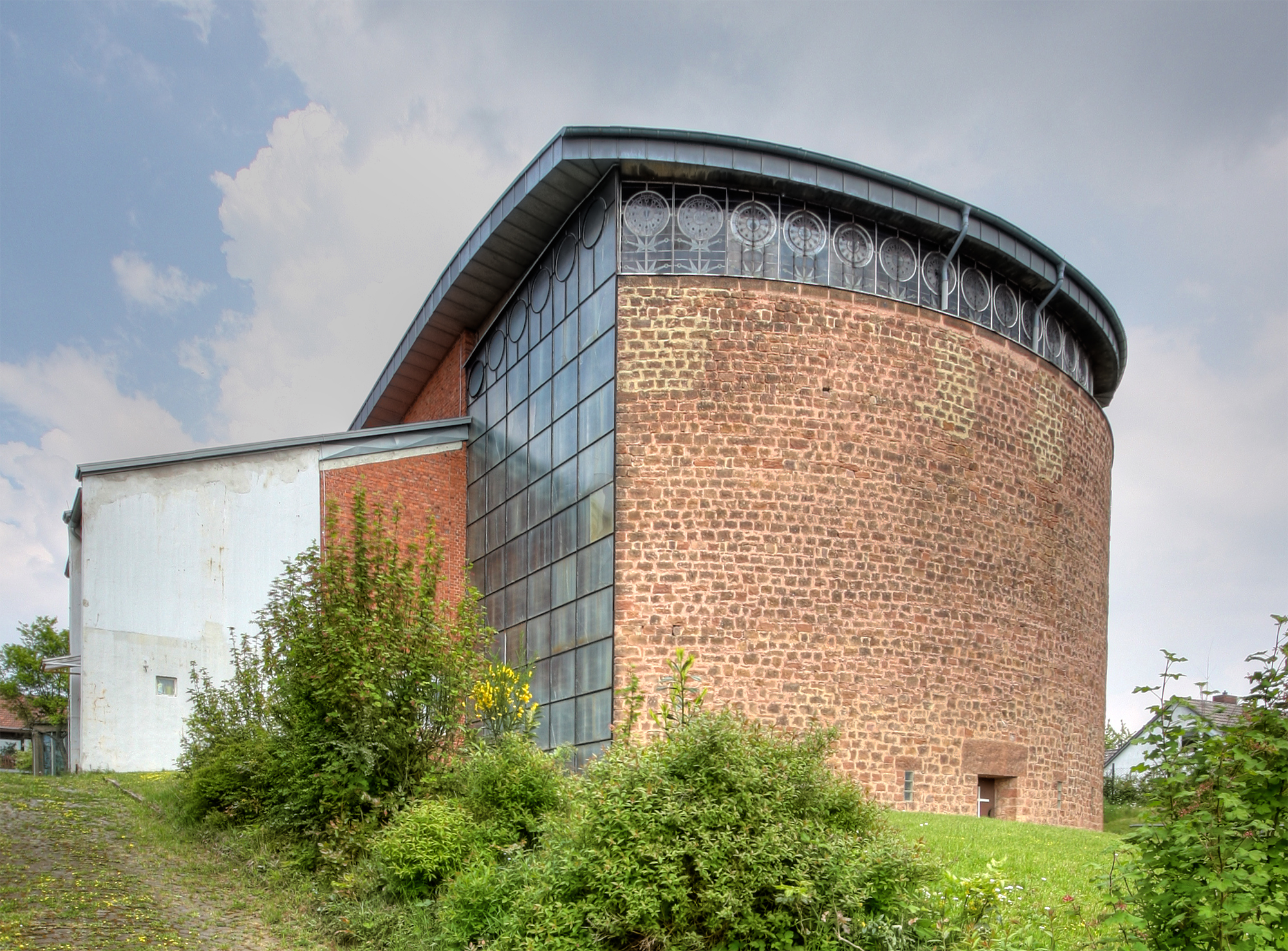 St. Hildegard, Sulzbach-Neuweiler, Architekt: Gottfried Böhm